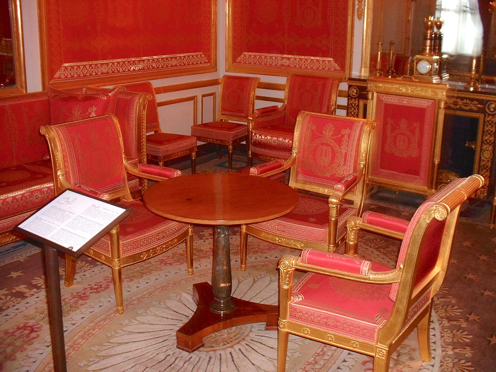 Guéridon au château de Fontainebleau sur lequel fut signé le Traité de Fontainebleau en 1814